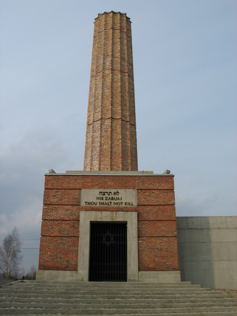 Pomnik Radegast w Łodzi